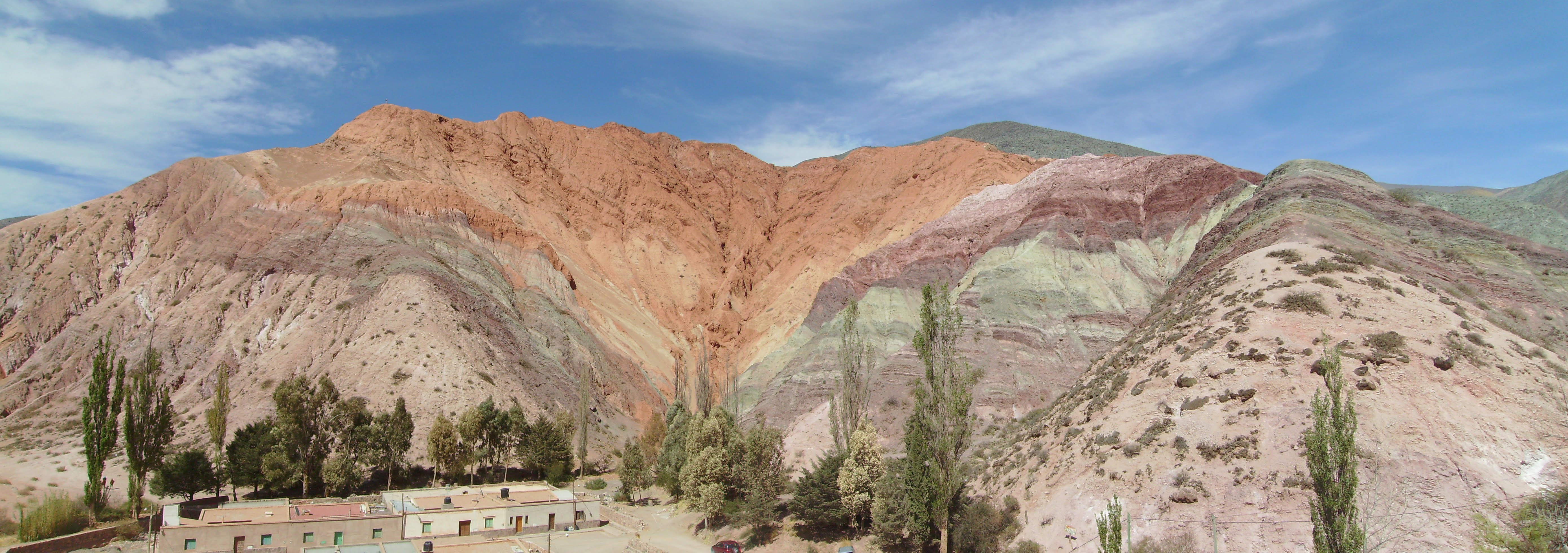 Cerro de los siete colores, Purmamarca, Juyjuy, Argentina